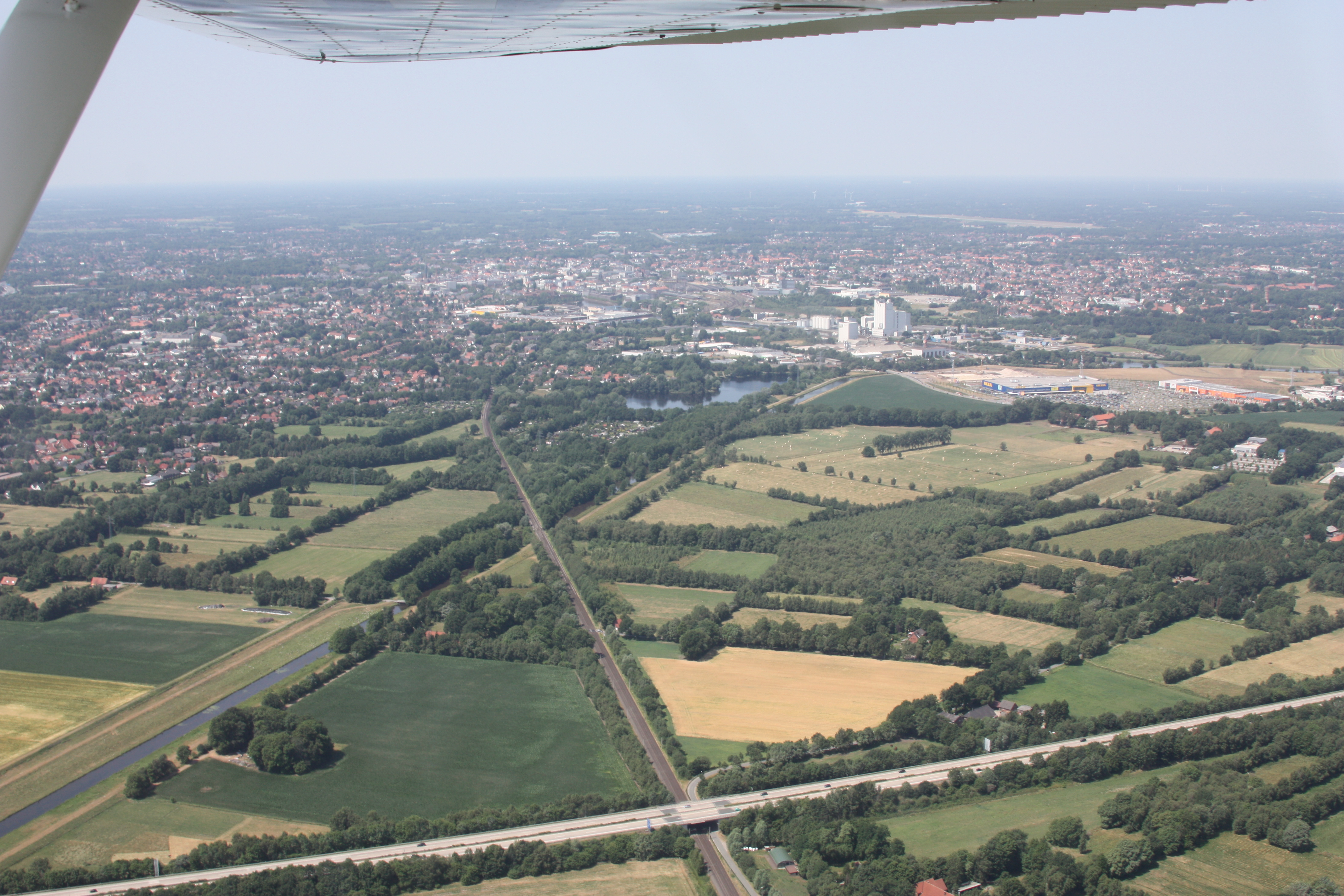 Flug über Oldenburg; von Wilhelmshaven kommend nach Hatten; Flughöhe 500 m = 1500 ft; Juli 2010